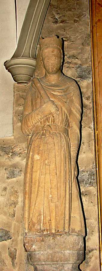 Statue de Saint Rambert (Ragnebert), Saint-Rambert-en-Bugey